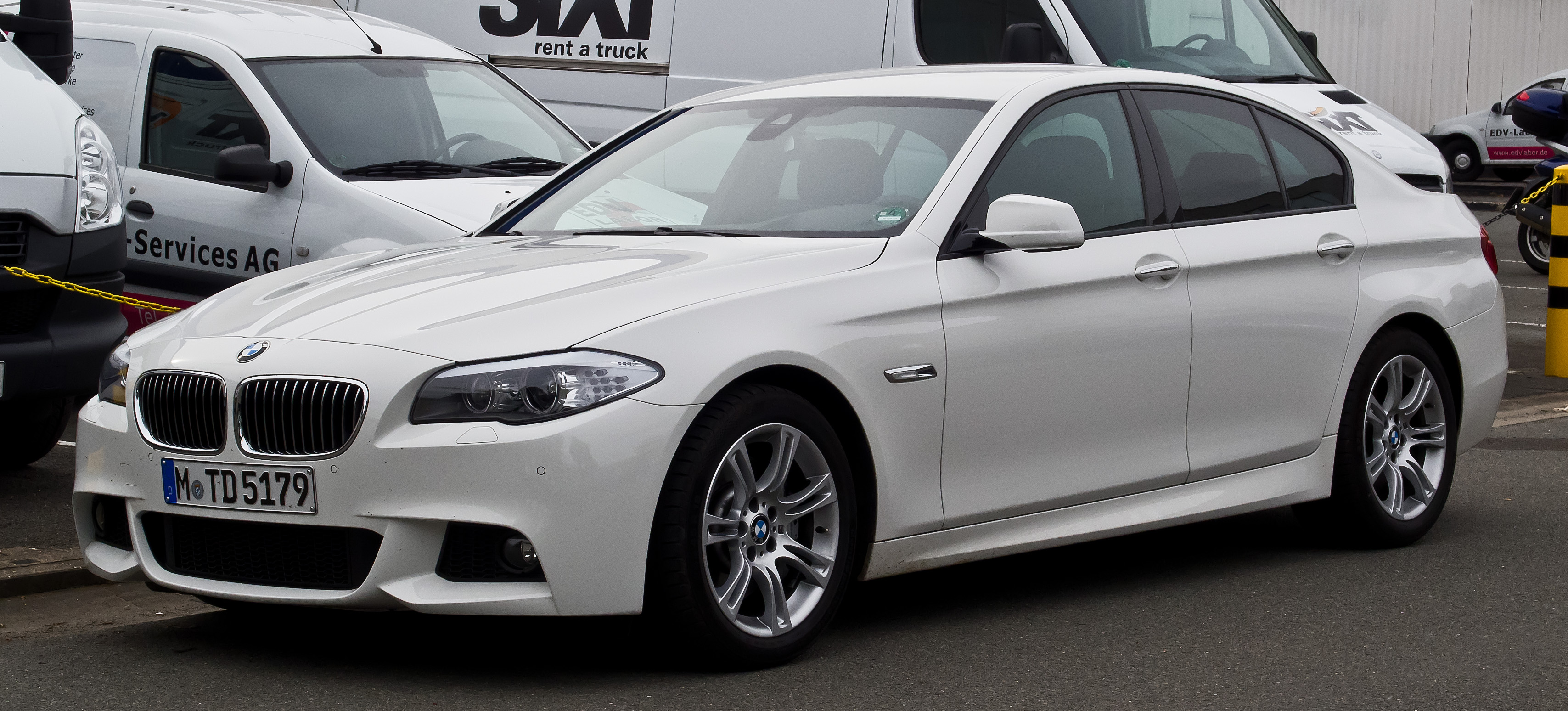 BMW 530d M-Sportpaket (F10)